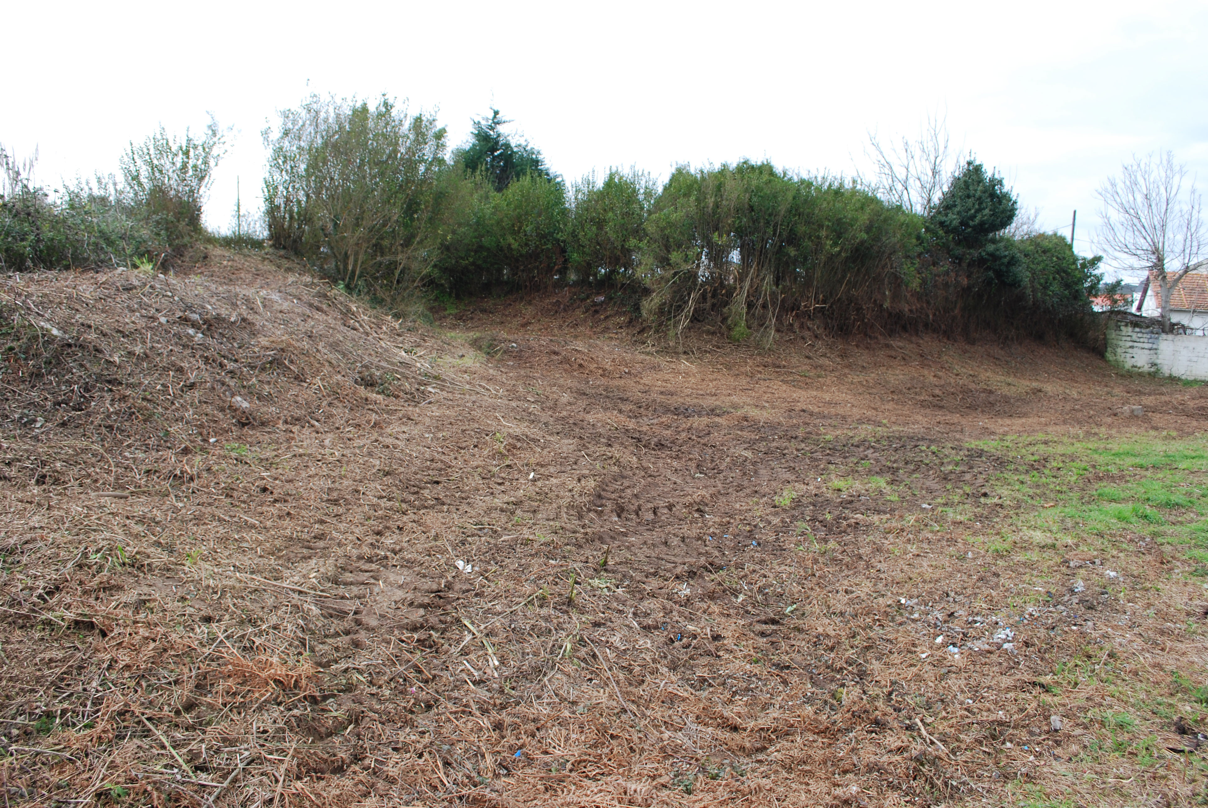 Vista dos parapetos do castro de Santa Mariña cara á ría de Ferrol; A Coruña Galiza Spain